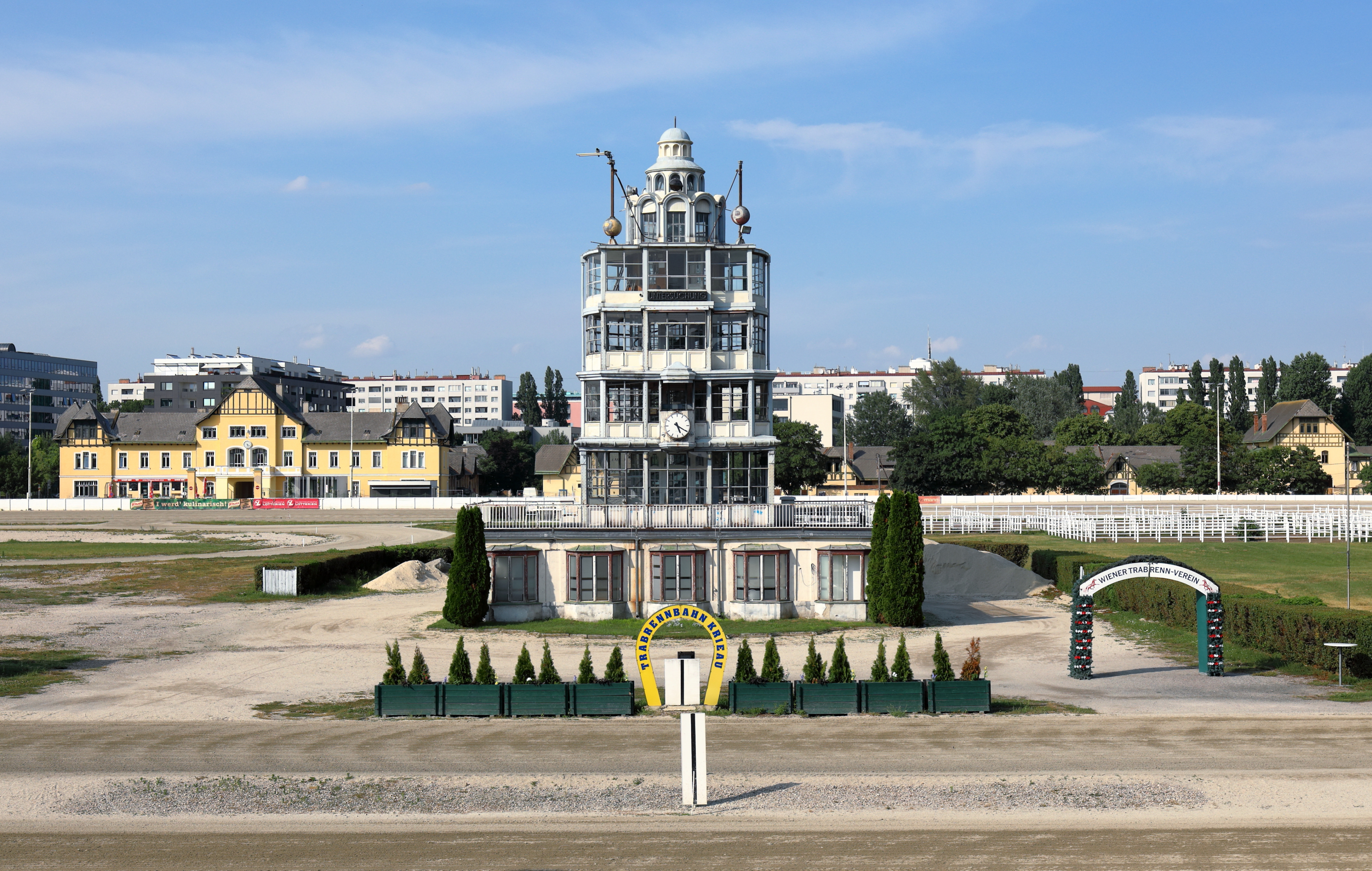 Der Zielrichterturm der Trabrennbahn Krieau im 2. Wiener Bezirk Leopoldstadt mit dem Verwaltungsgebäude links hinten und rechts hinten die Stallungen. Der Trabrennplatz in der Krieau, ein Teil des Praters, wurde am 29. September 1878 eröffnet. Nachdem die ursprüngliche hölzerne Tribünenanlage in die Jahre gekommen war, wurde sie von 1912 bis 1913 durch die Architektengemeinschaft Emil Hoppe, Marcel Kammerer und Otto Schönthal erneuert. Der Zielrichterturm als letzter Bauteil wurde erst nach dem Ersten Weltkrieg im Jahr 1919 errichtet.